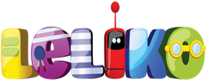 En cartoon network